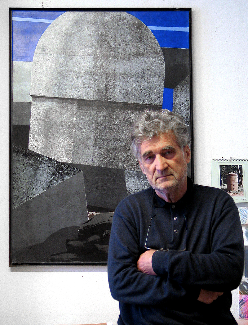 EINMANNBUNKER hat János Nádasdy sein Werk von 1994 betitelt, ein Seriegrafie über mixed Media auf Leinwand, 140x90 cm, hier zu sehen in der Privatwohnung des Künstlers ...